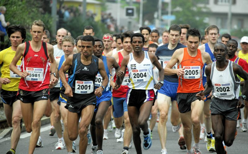 Hallwilerseelauf 2006, Spitze